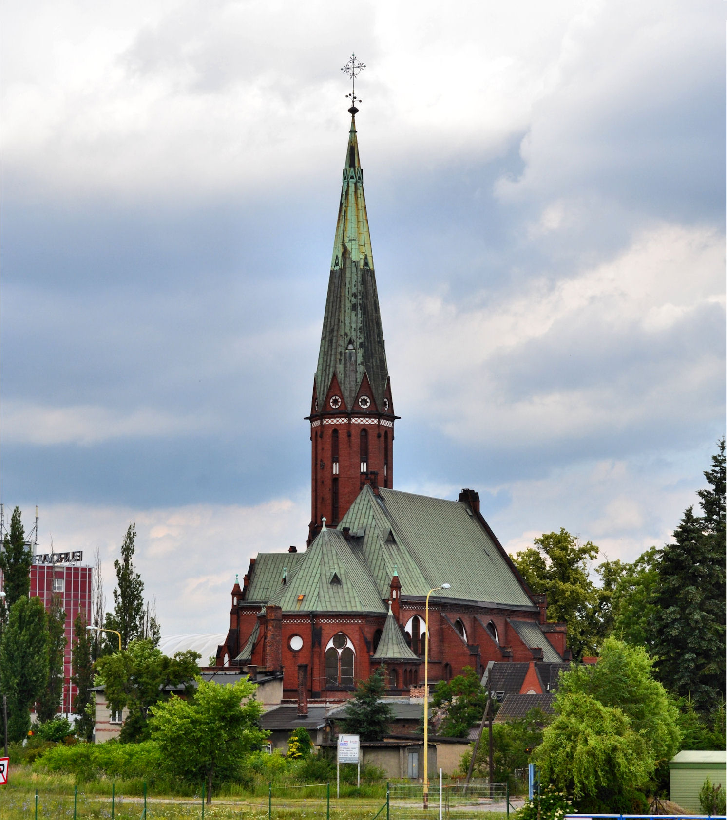 Kościół św. Trójcy przy ul. Energetyków w Szczecinie